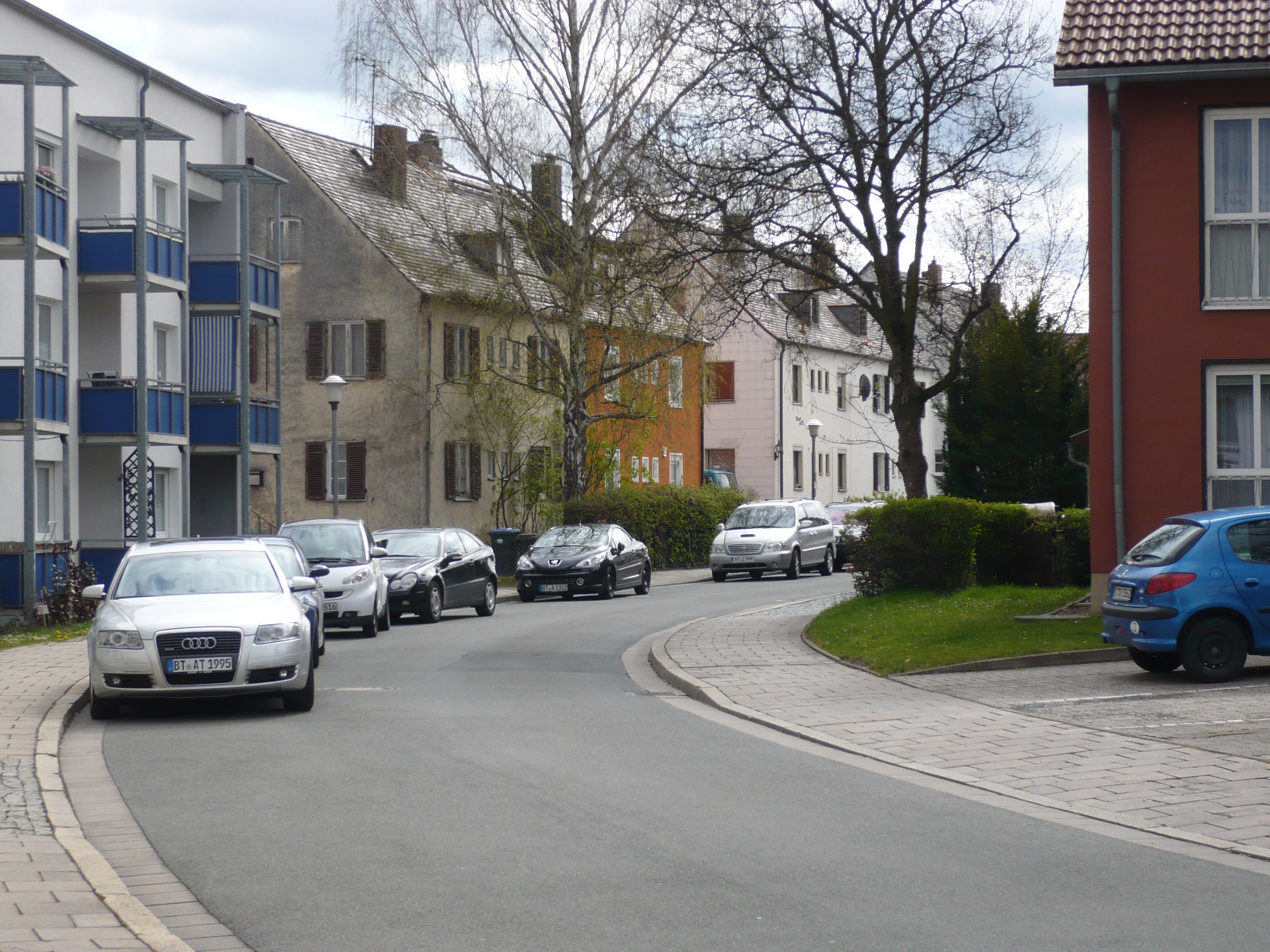 Bayreuth Von-Helmholtz-Straße